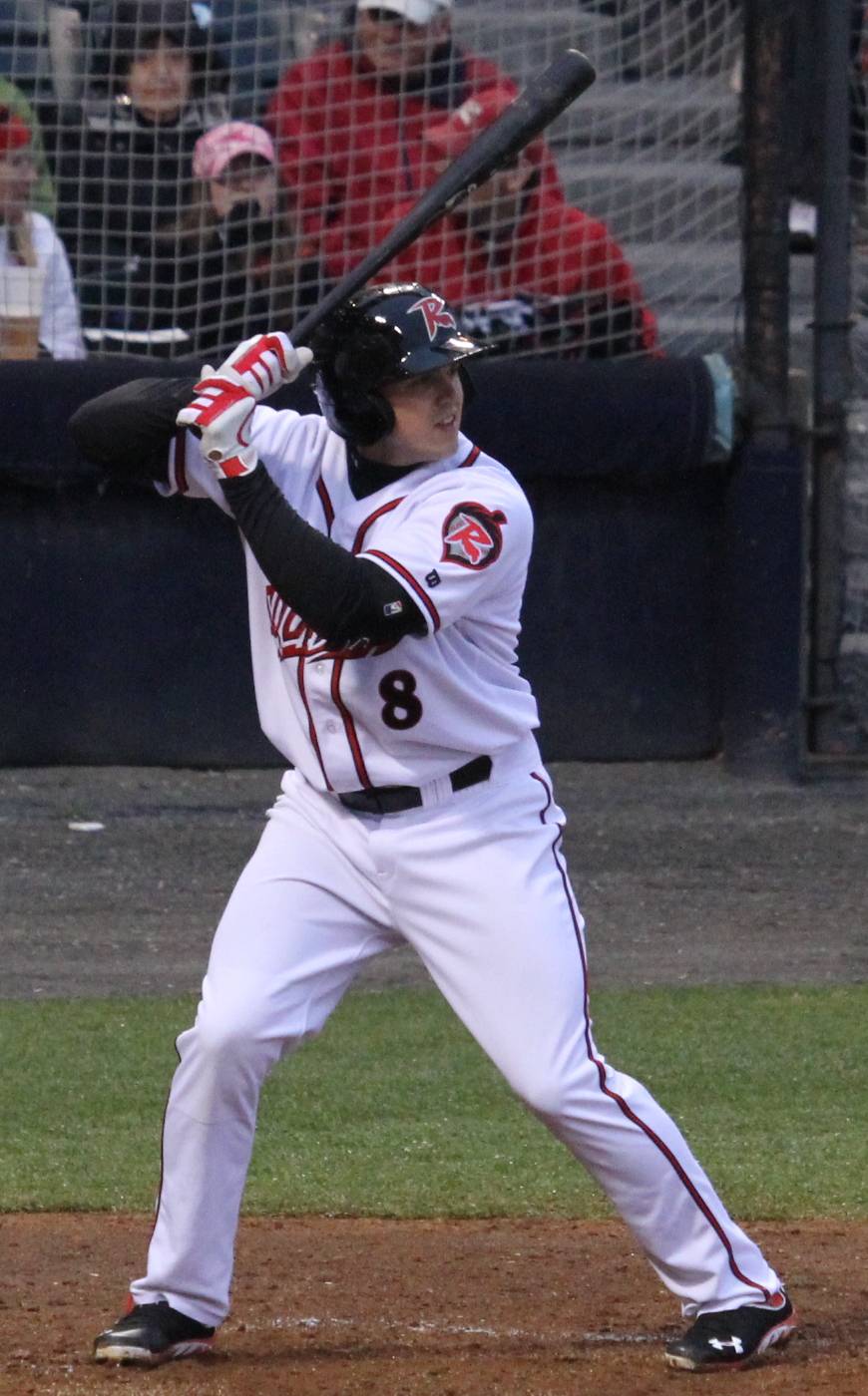 Adam Duvall